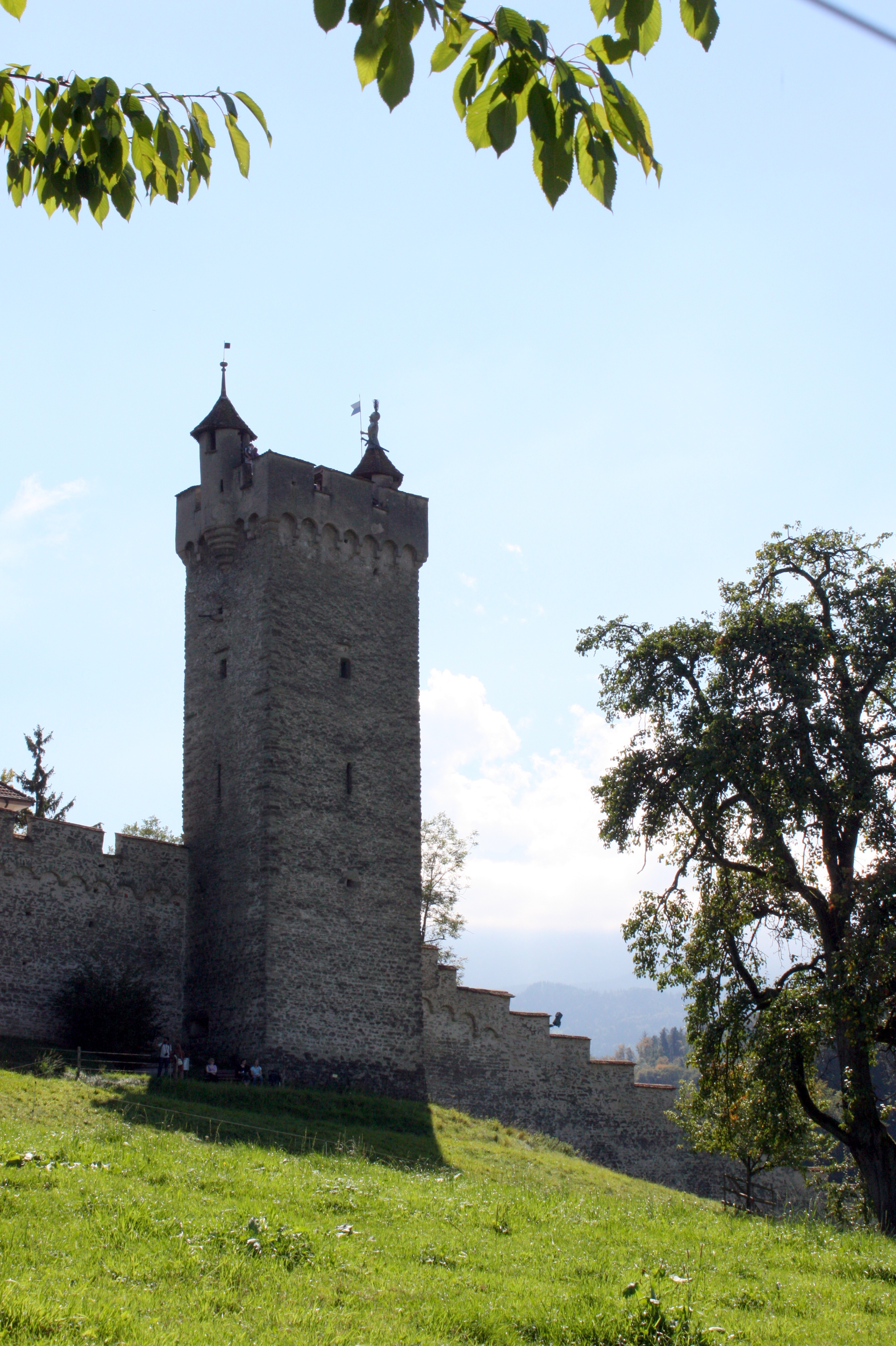 Nordansicht Mändliturm